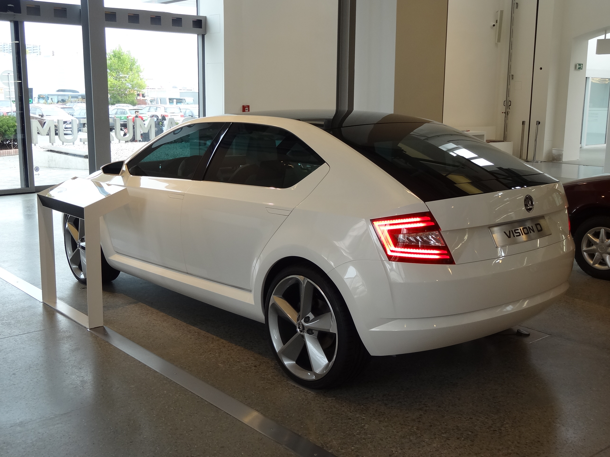 "Die Studie VisionD präsentiert das zukunftsweisende Designkonzept, das mit dem Rapid zum ersten Mal in Serie geht: langer Radstand, kurze Überhänge, klare und präzise Linien, neues Logo, Kristallglas-Applikationen als Referenz an die böhmischen Wurzeln der Marke Skoda" (Hinweistafel)